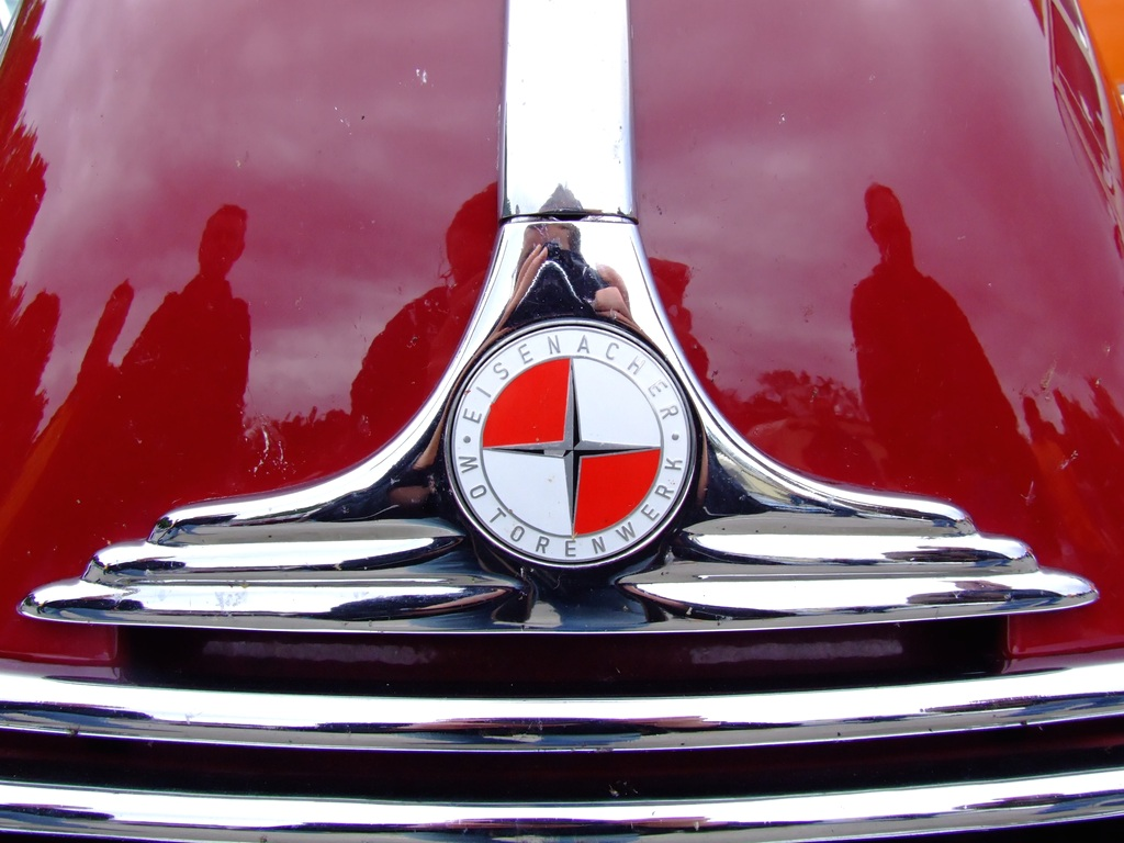 EMW-Logo auf der Haube eines EMW 340